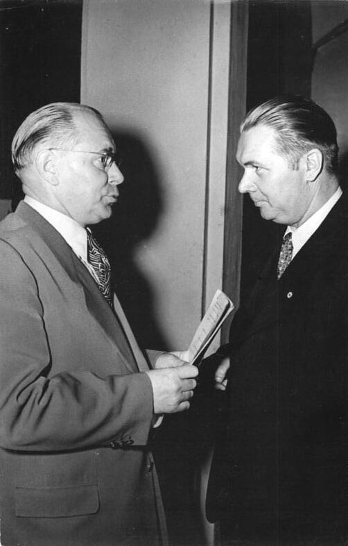 Illus-Sturm 15.9.1951- Ausserordentliche Volkskammersitzung Am 15.9.1951 fand im Haus der Volkskammer in Berlin eine Ausserordentliche Sitzung der Volkskammer statt, auf der Ministerpräsident Grotewohl eine Regierungserklärung abgab. UBz: Nationalpreisträger Fred Oelßner im Gespräch mit einem Mitglied seiner Fraktion